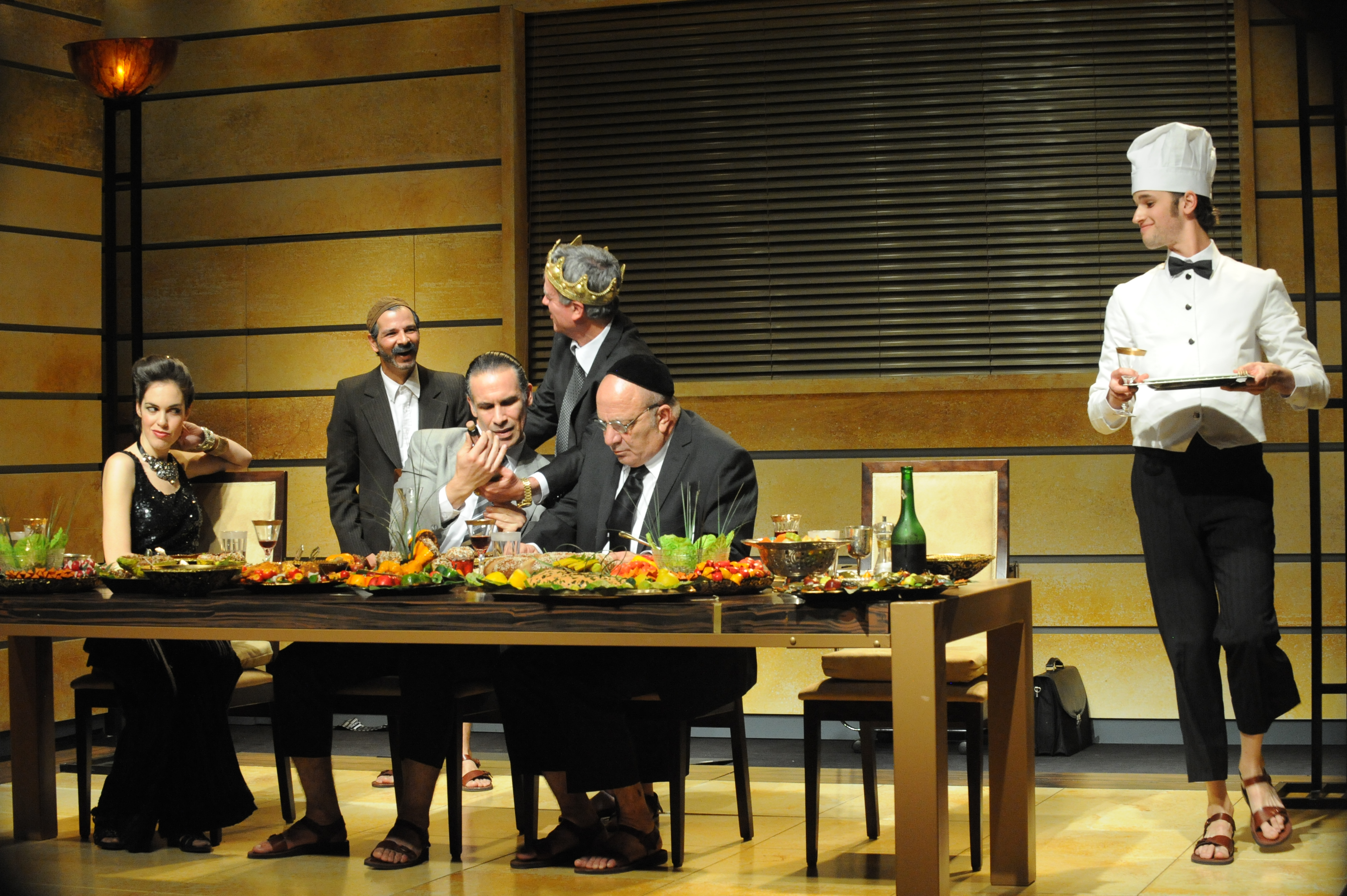 ההצגה "אוכלים" בבימויו של מיקי גורביץ', תיאטרון החאן, 2011